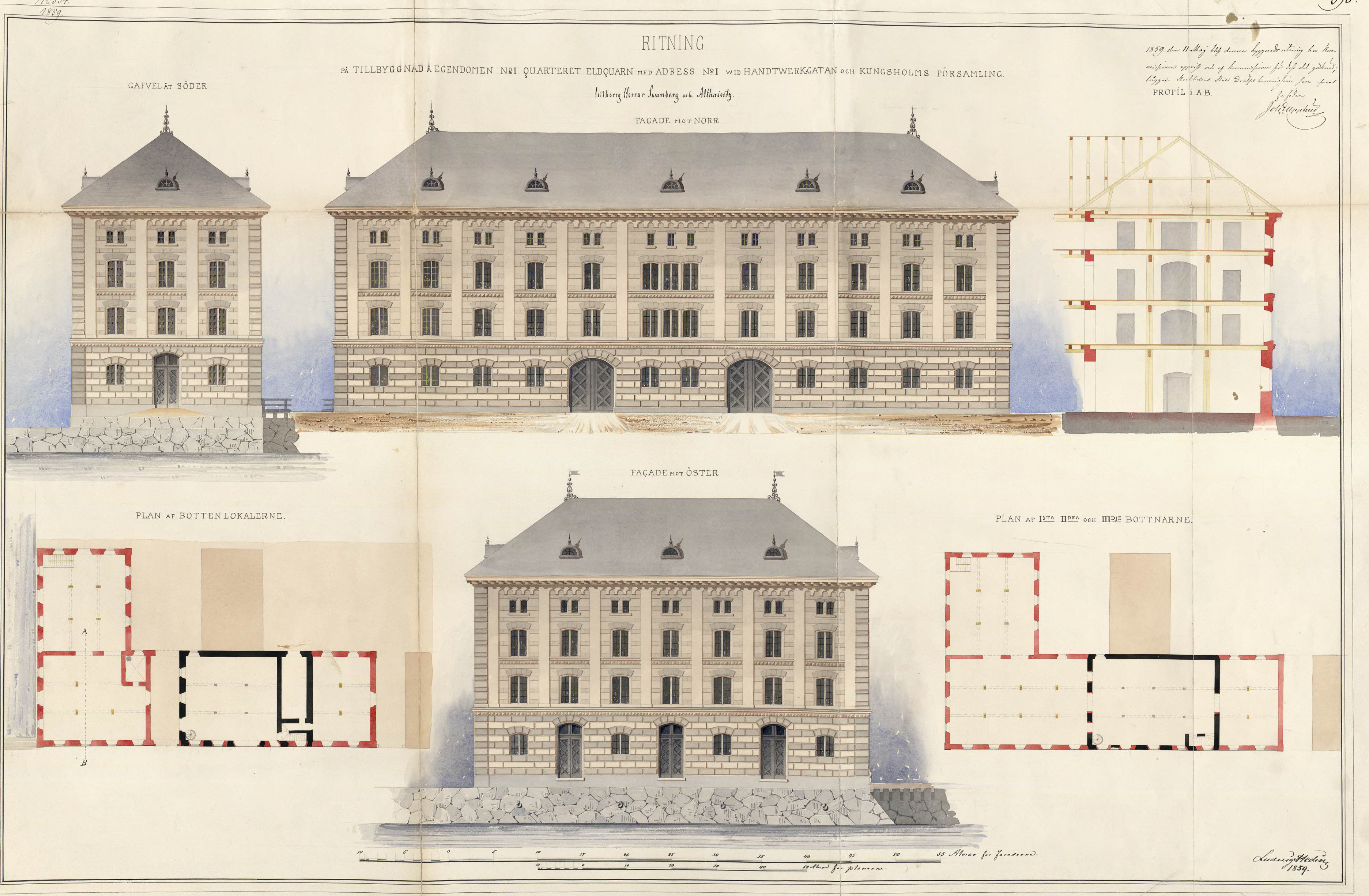 Byggnadsritning till Eldkvarn 1859 av Ludvig Hedin